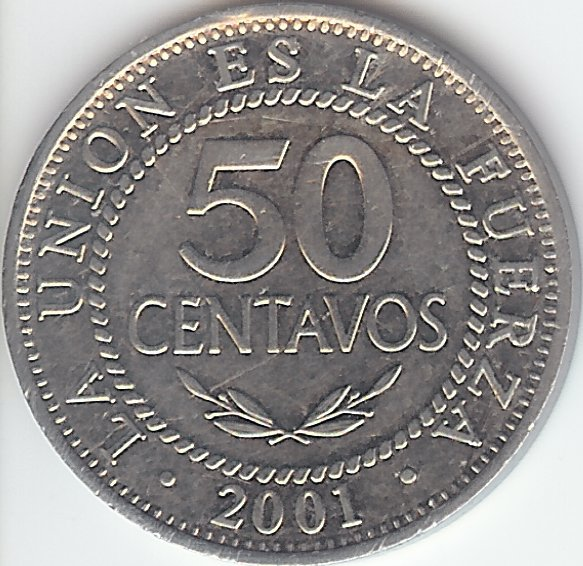 Pièce de monnaie de Bolivie